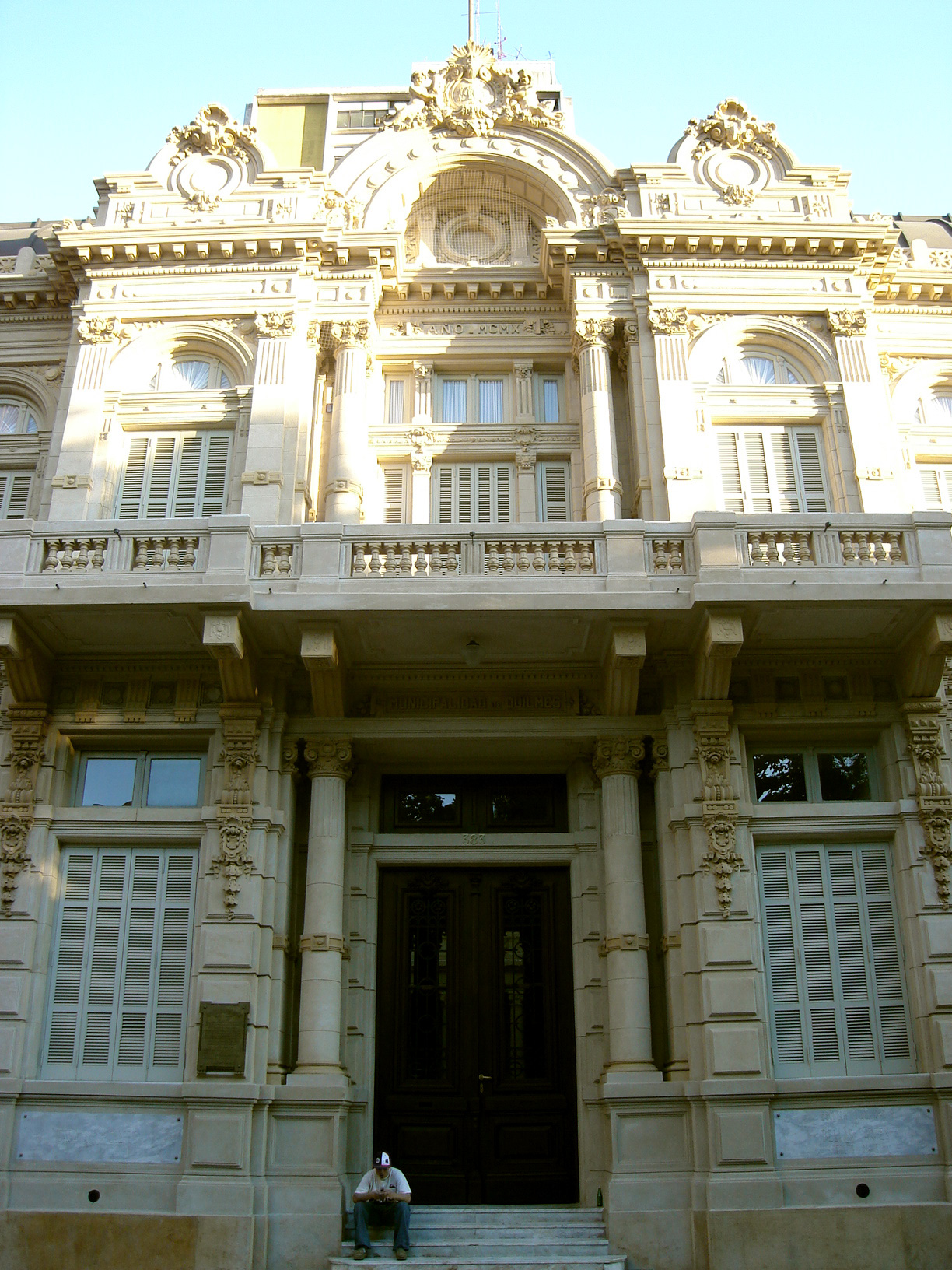 Frente de la vieja Municipalidad del Partido de Quilmes, en la provincia de Buenos Aires, Argentina